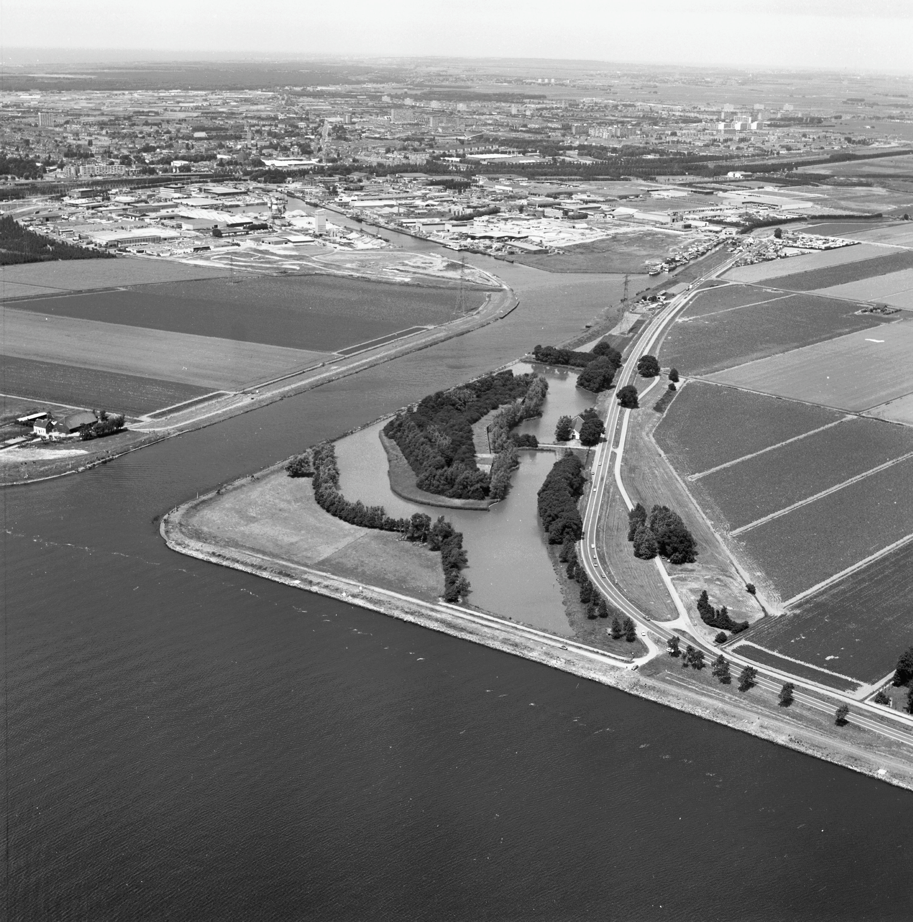 luchtfoto's